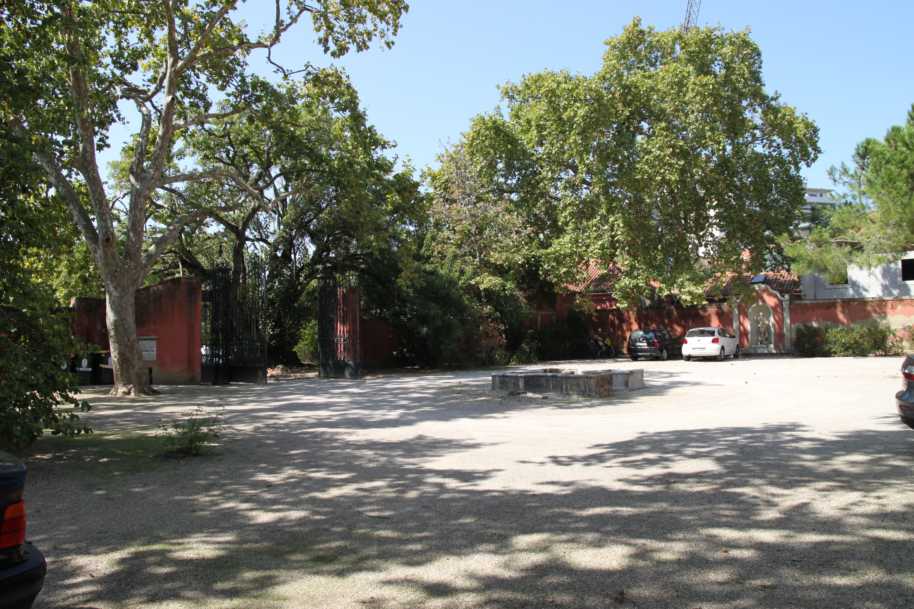 Quinta dos Lagares d'El-Rei This file was uploaded for Wiki Loves Monuments in Portugal with the unique identifier 75032.